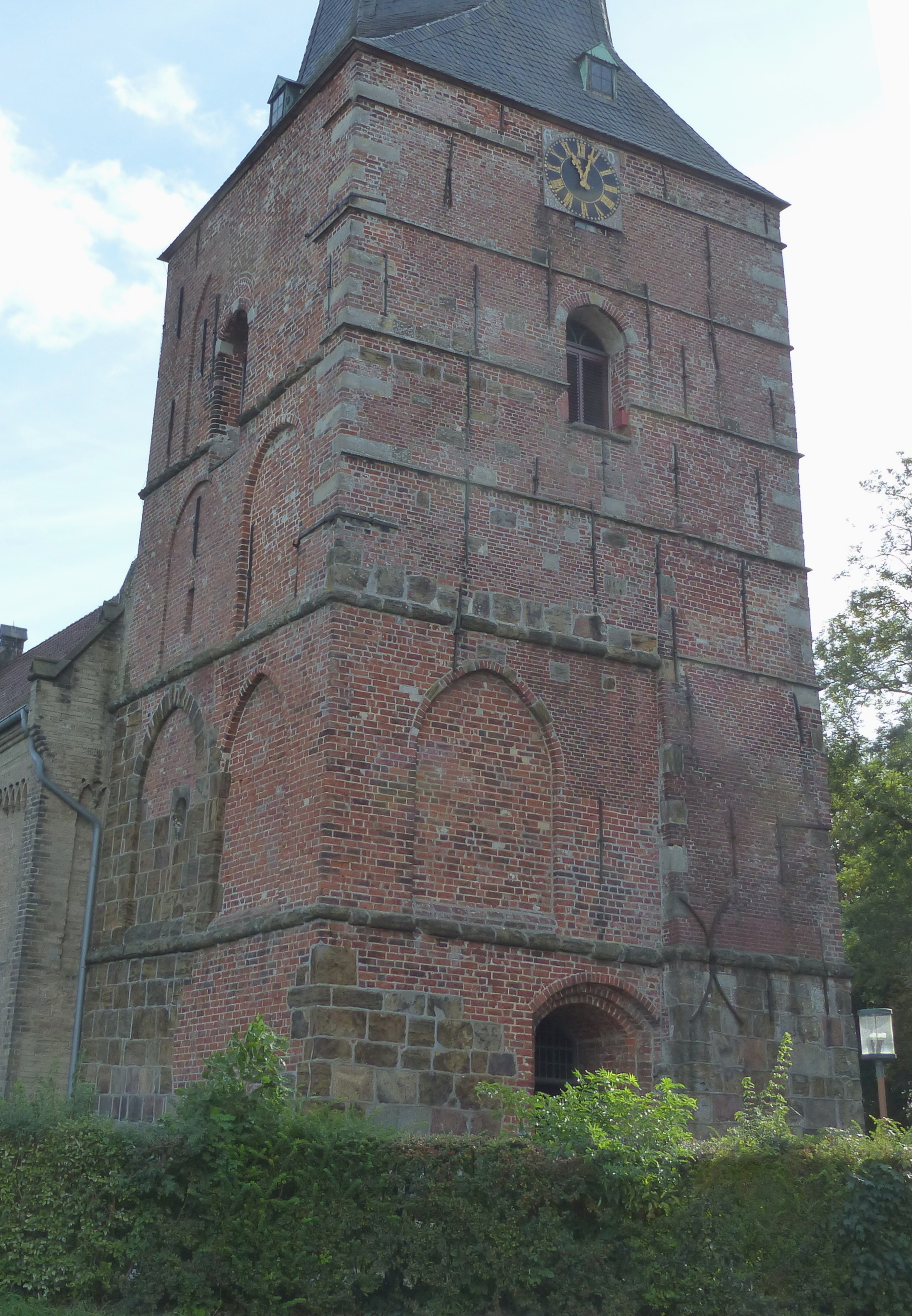 KIrche Blexen, Turm von Westnordwest